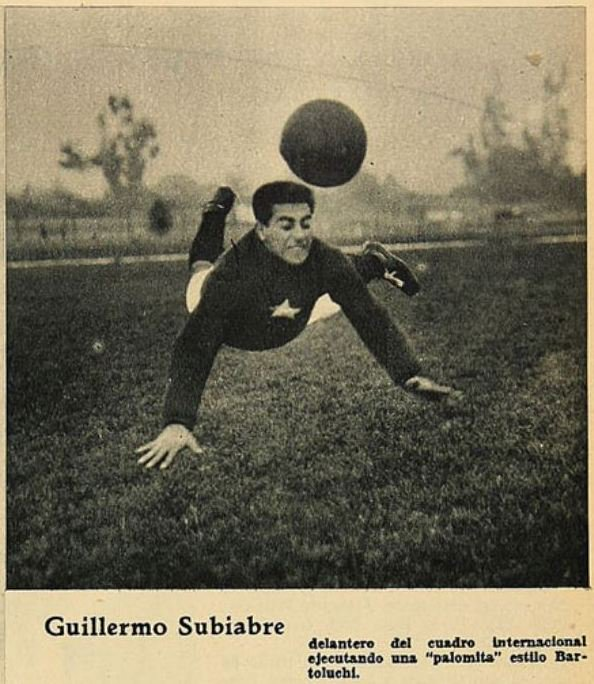 Guillermo Subiabre ejecutando una palomita